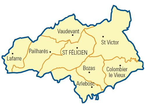 Carte détaillée des communes du canton (Ardèche)